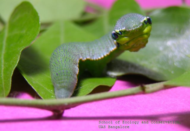 Hebomoea glaucippe caterpillar, India